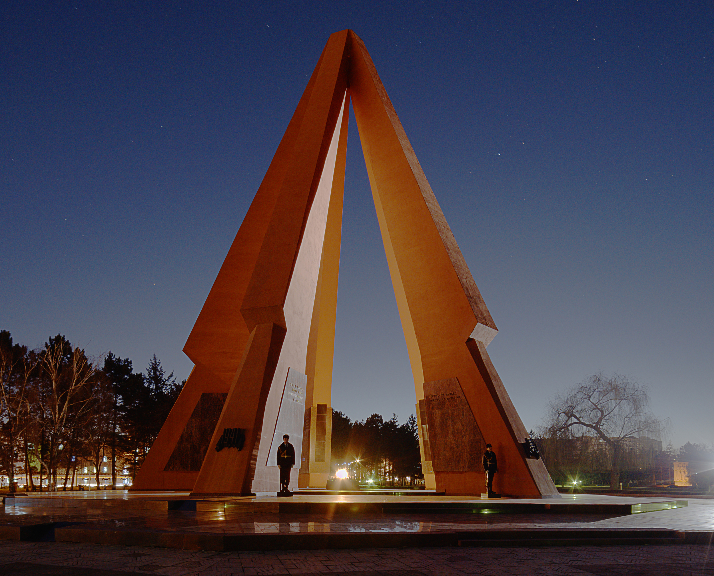 Chisinau War memorial site at night. Chisinau (Chișinău), Moldova. Late 2014.